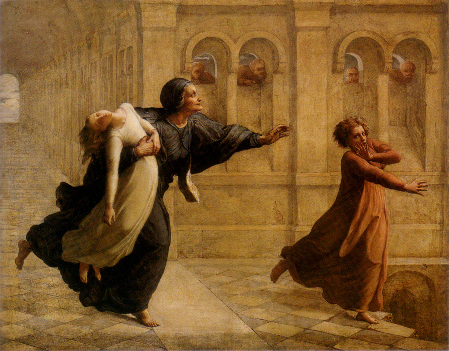 Poème de l'âme (8)